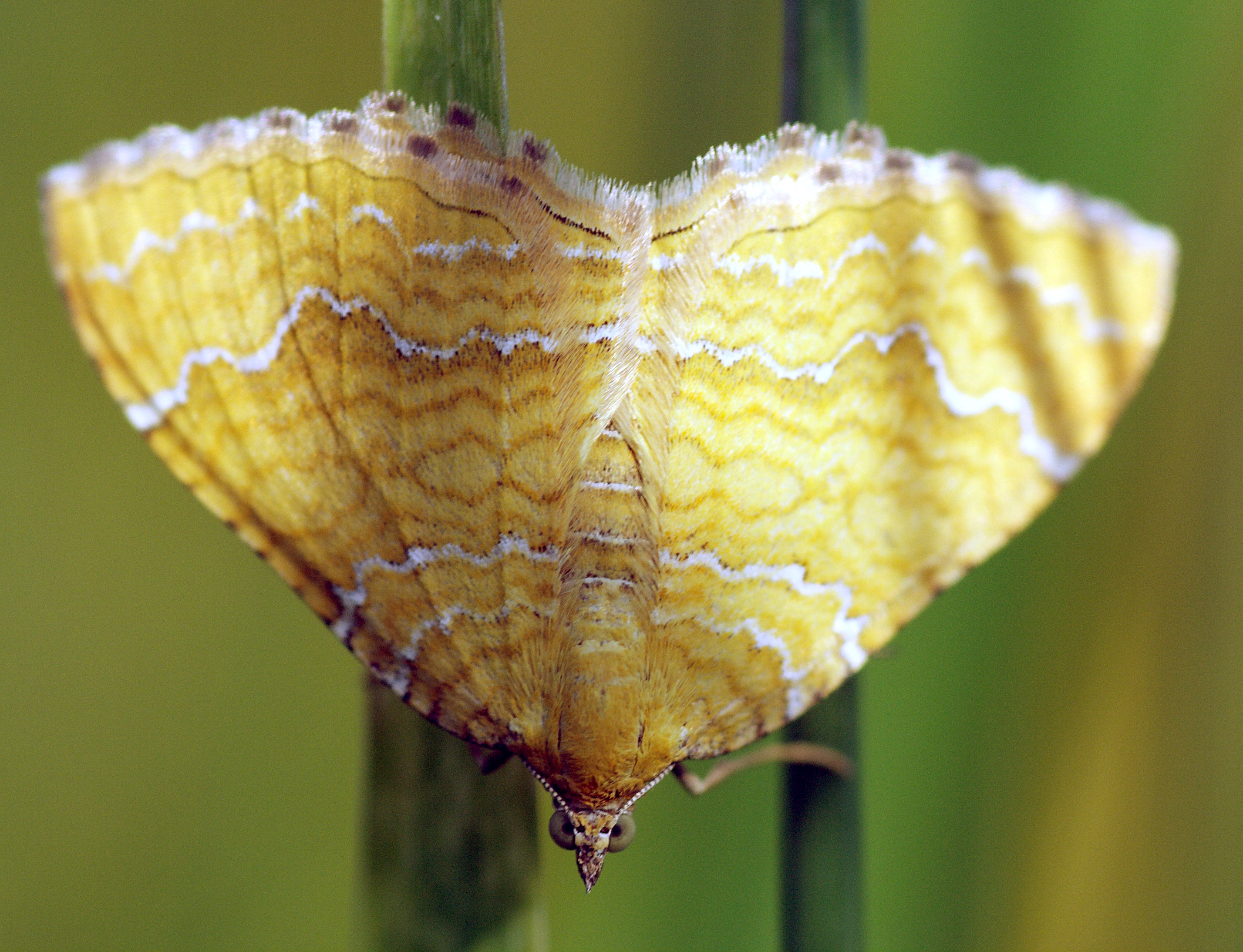 Kollane kirivaksik Põlvamaal